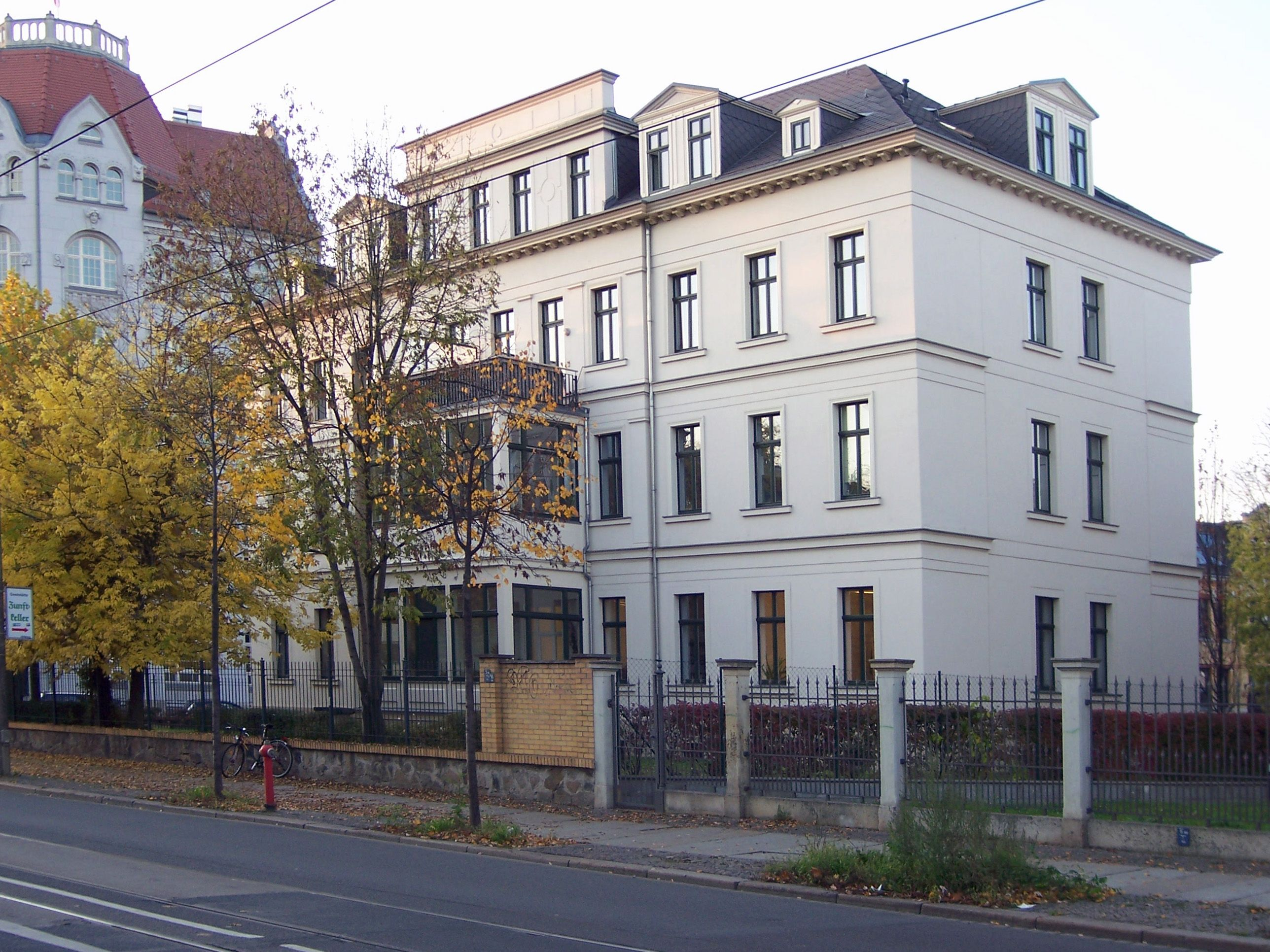 Wohn- und Sterbehaus Gustav Theodor Fechner in Leipzig, Scherlstraße 2